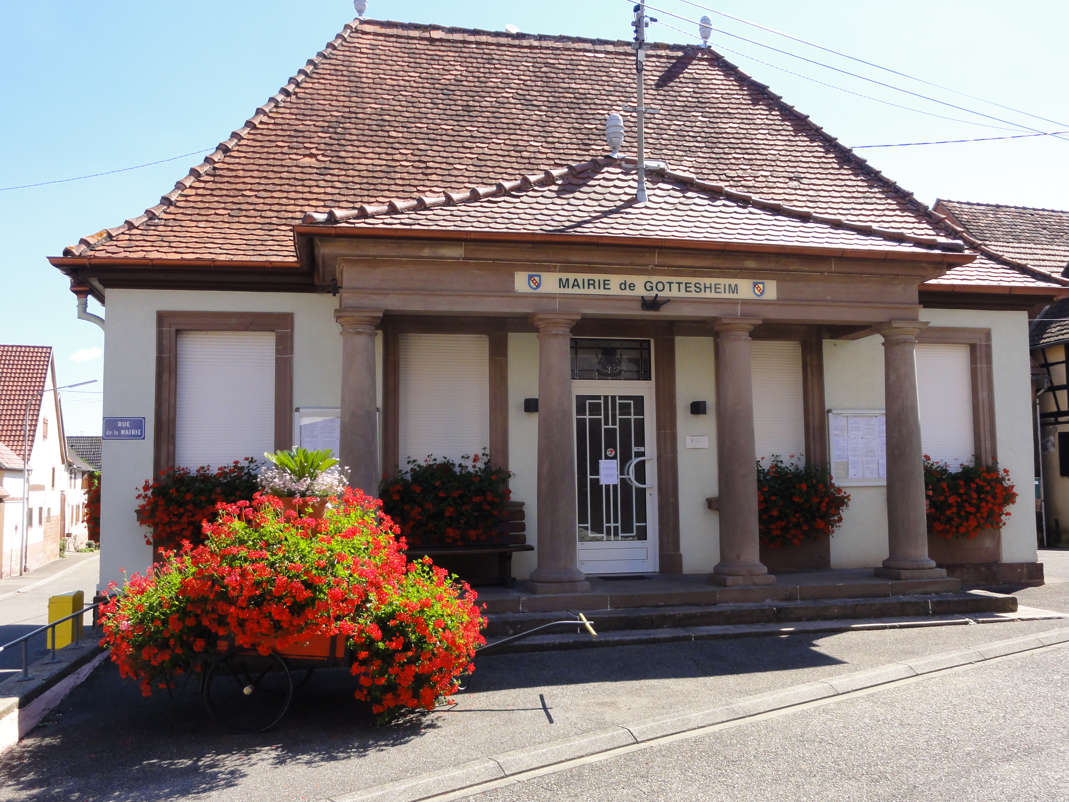 Alsace, Bas-Rhin, Gottesheim, Mairie.